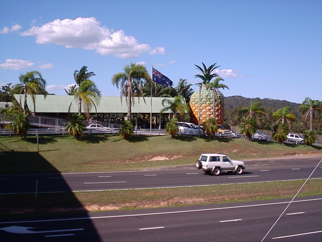 De Big Pineapple nabij Nambour, Australië.